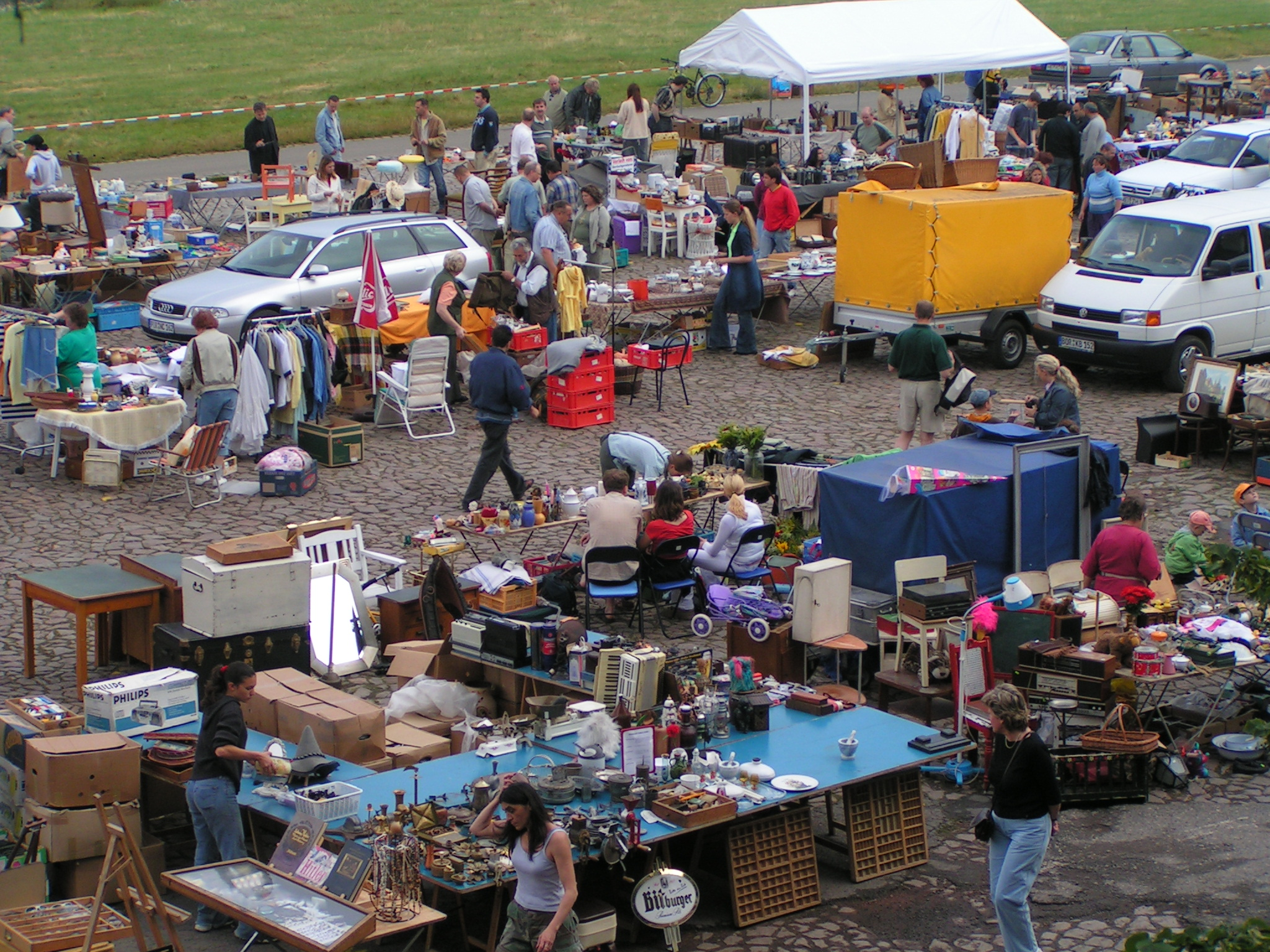 Dresden Flohmarkt Elbwiese 17. Juli 2004 Fotograf: Benutzer:Stefan_Kühn/Fotogalerie